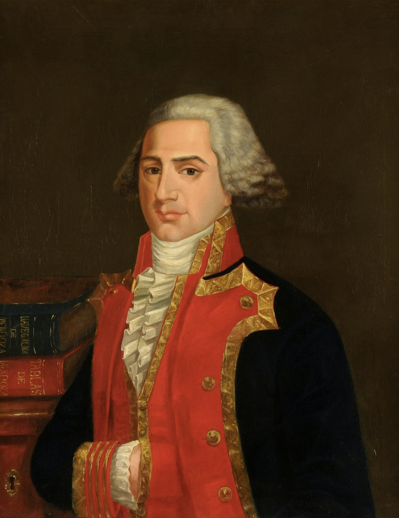 Retrato del capitán de navío de la Armada Española José Mendoza y Ríos (1763-1816) en el Museo Naval de Madrid.